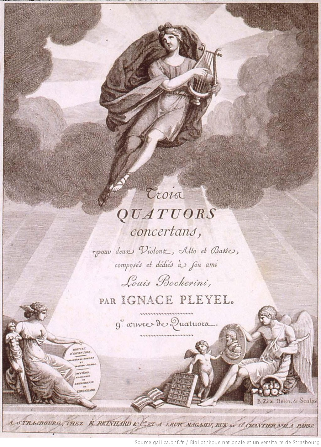 Frontispice des Trois quatuors concertans... par Ignace Pleyel